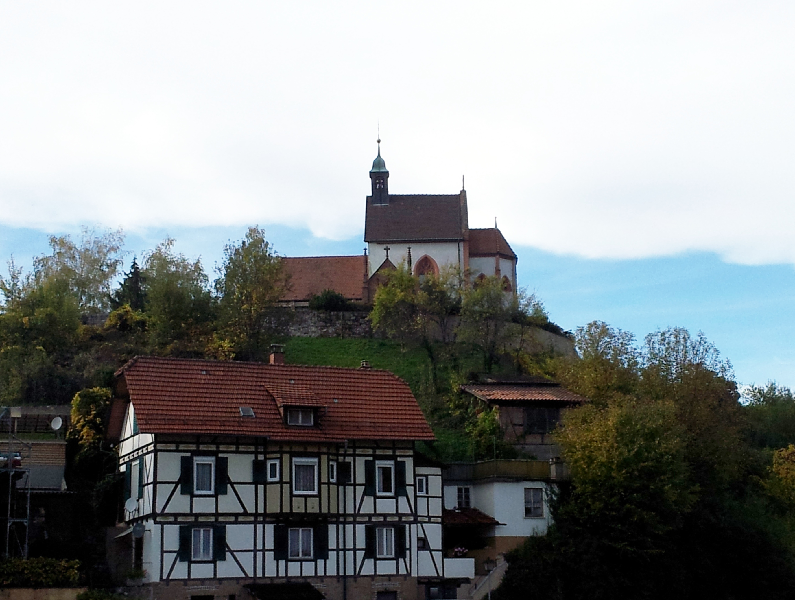 St. Wendelinuskapelle Weisenbach